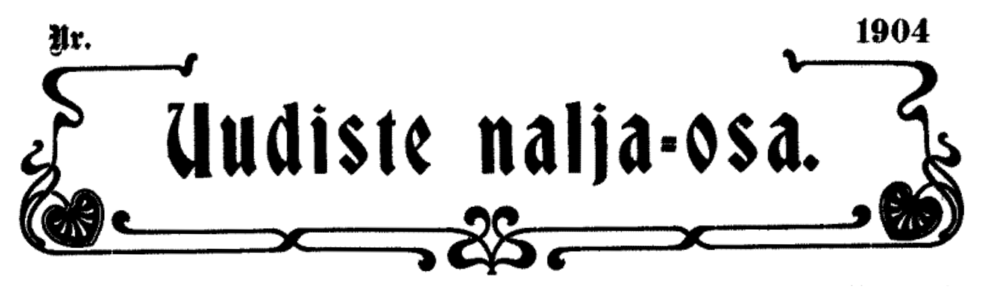 Uudiste nalja-osa, päismik